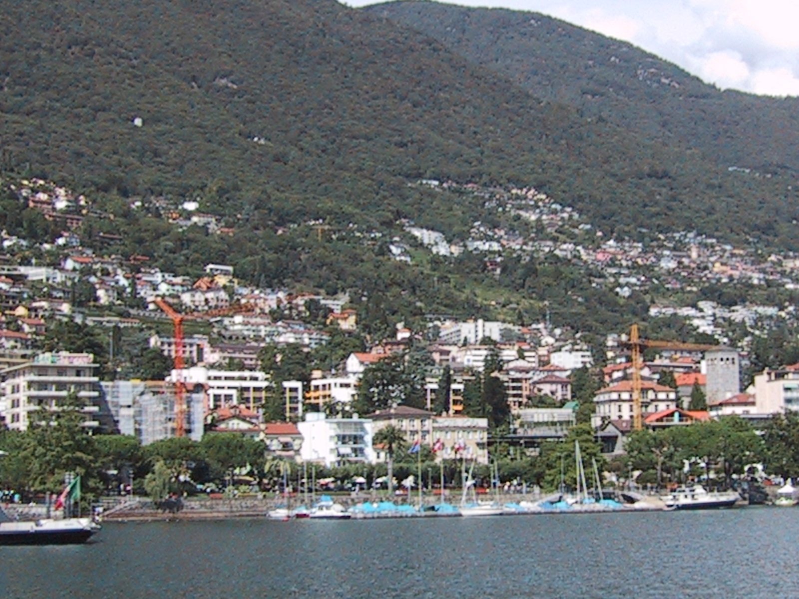 Muralto, Kanton Tessin